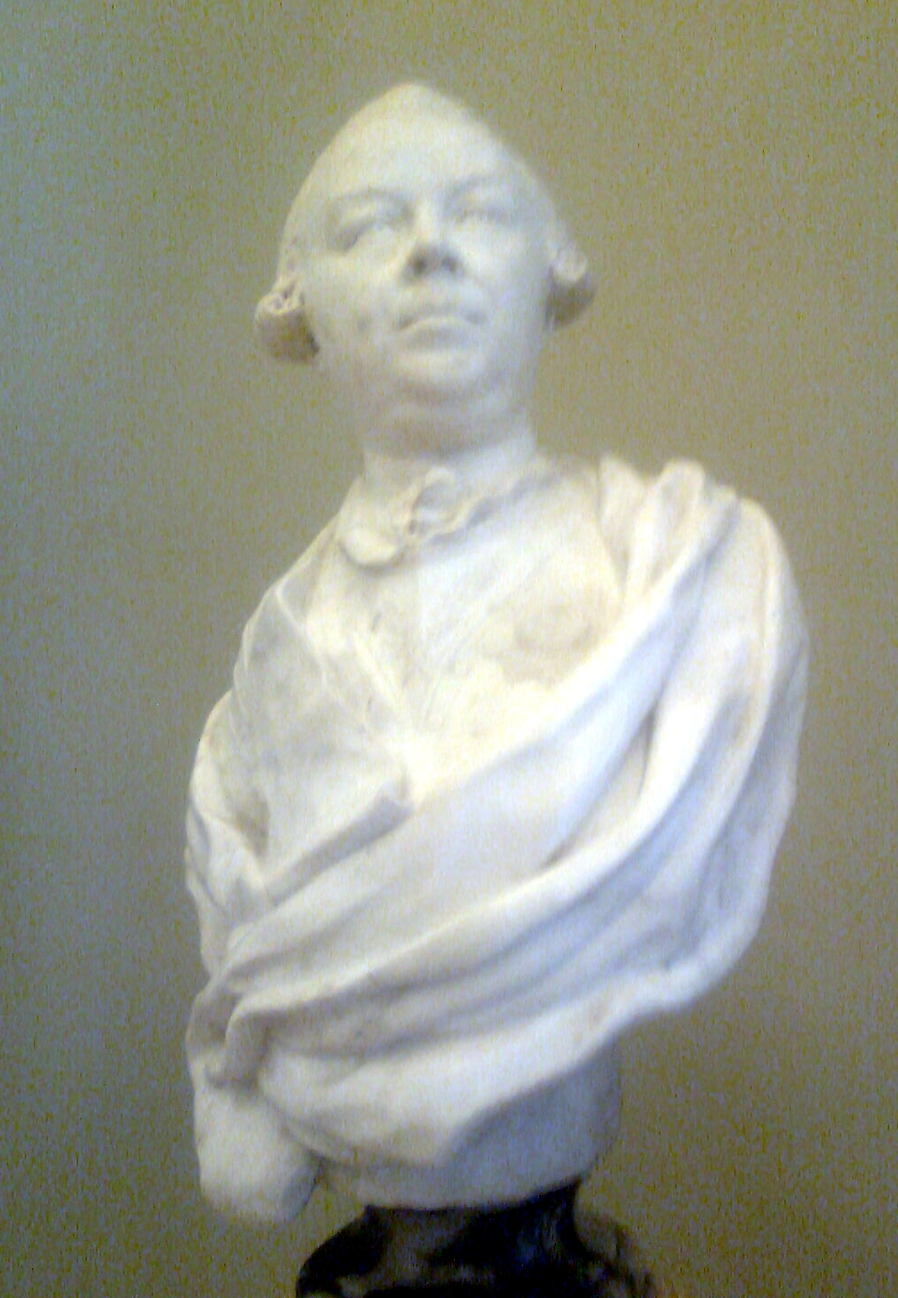 Румянцев, скульптор Л.М. Гишар (этикетка нрзб). Михайловский замок